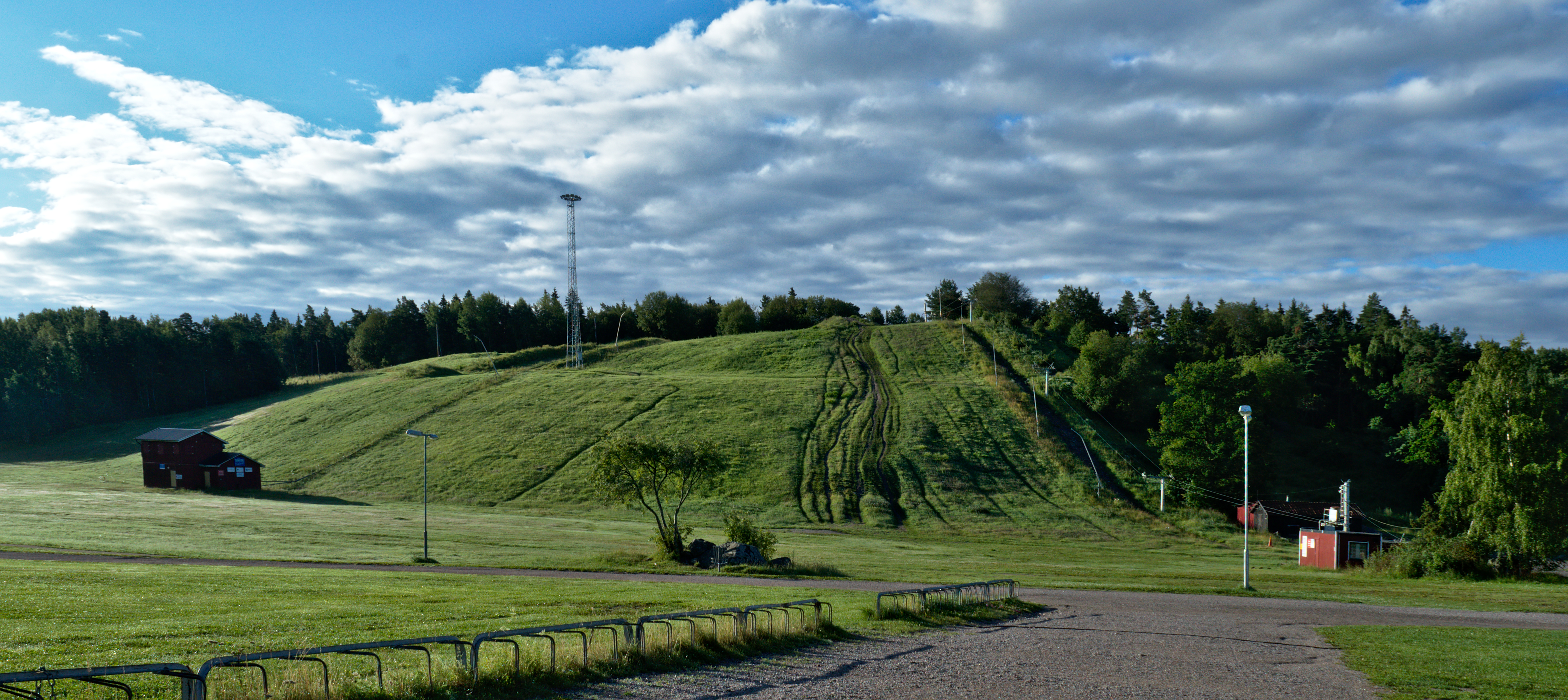 Naturreservatet Vilsta i Eskilstuna. Backen sedd från raststugan.